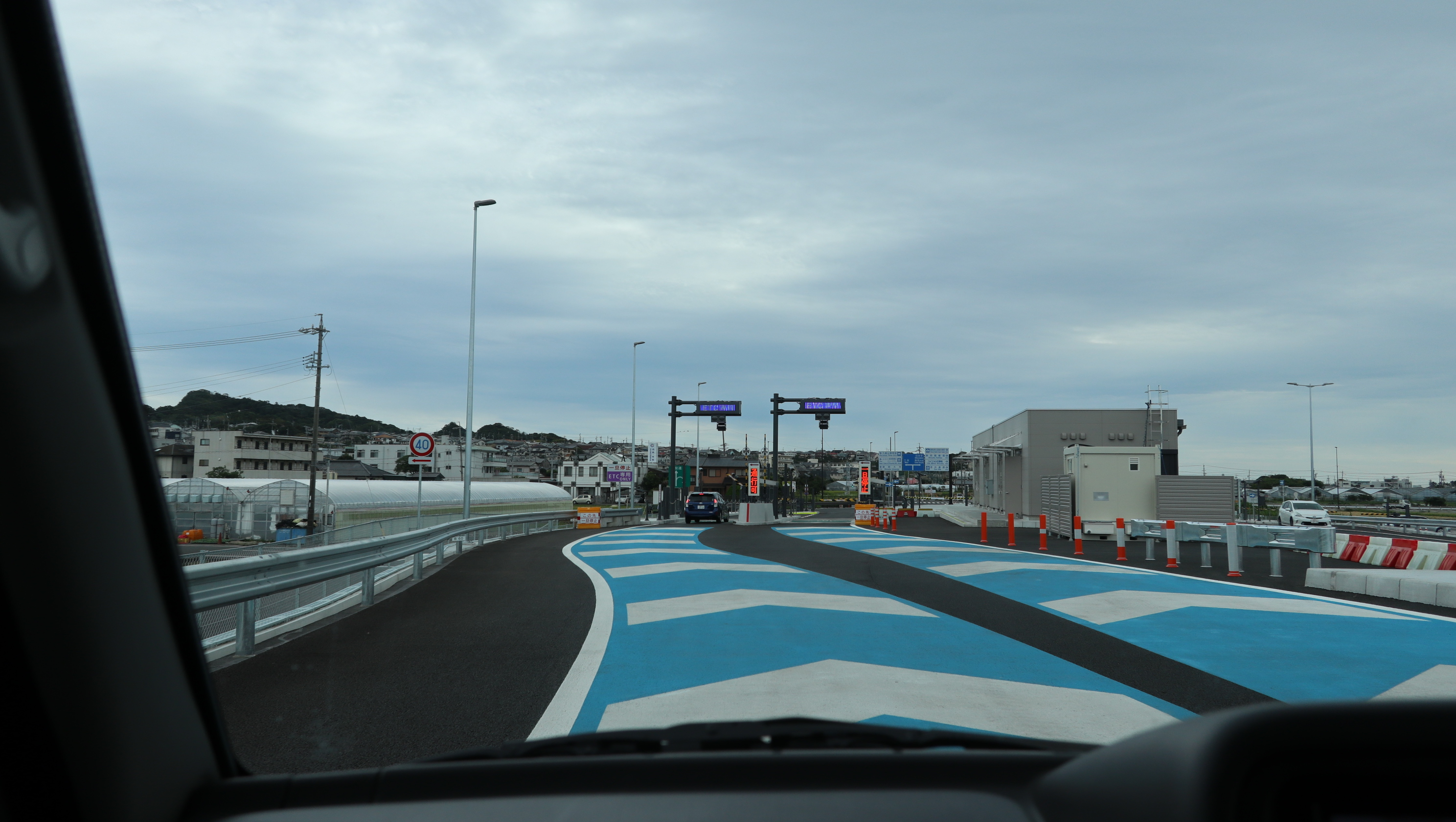 日本平久能山スマートインターチェンジ料金所 静岡県内で初めて2レーン式を採用した